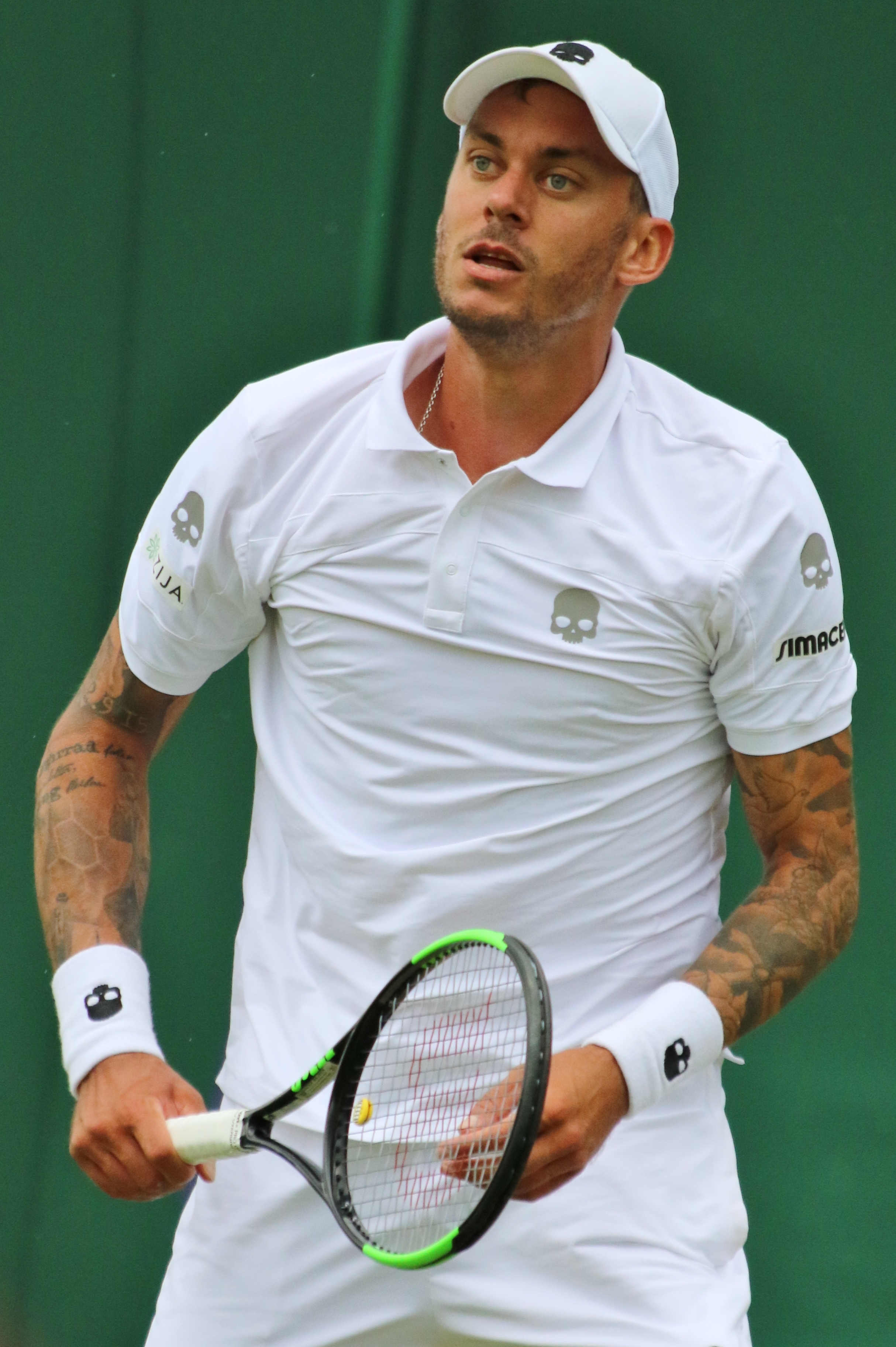 Haider Maurer WM17 (16)